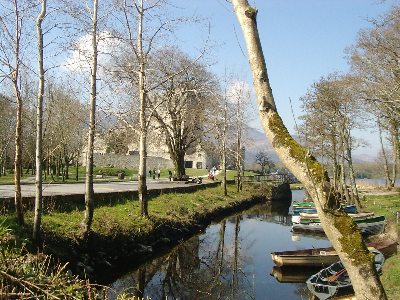 Ross Castle, gelegen nabij Killarney